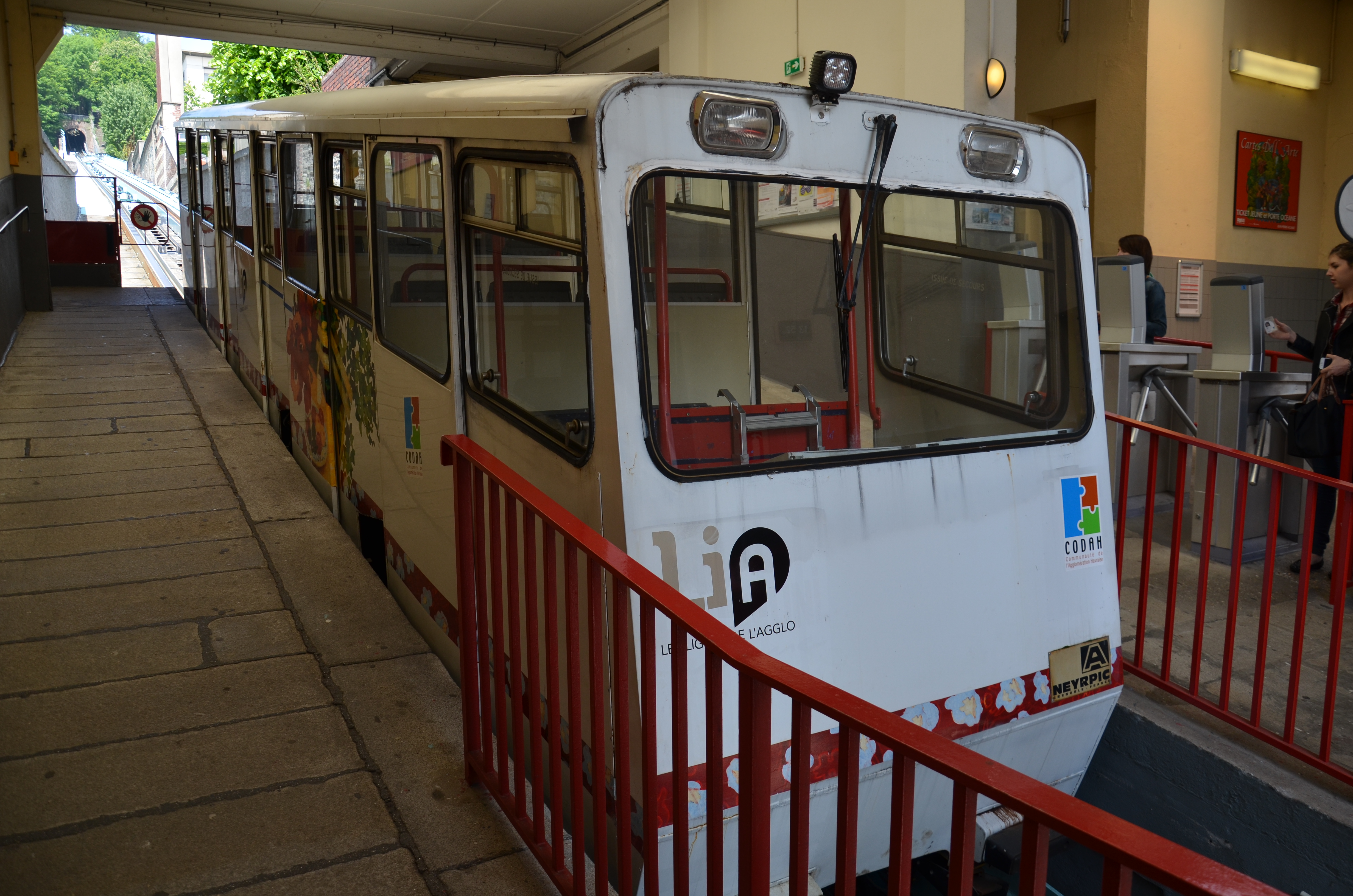 Funiculaire de la Côte à la station basse du Havre (rue Gustave Flaubert).